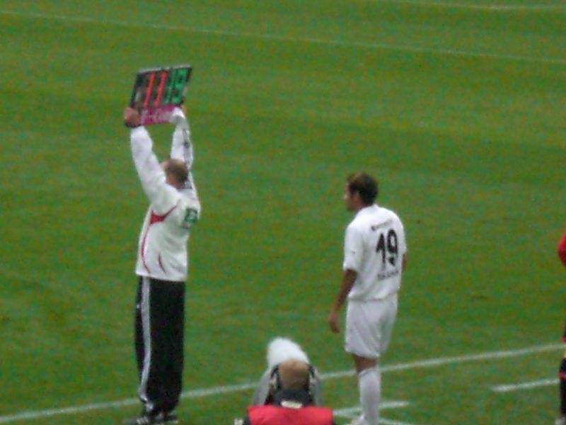 Takahara vor seiner Einwechslung beim Bundesligaspiel gegen Hannover 96 am 8. Februar 2006.